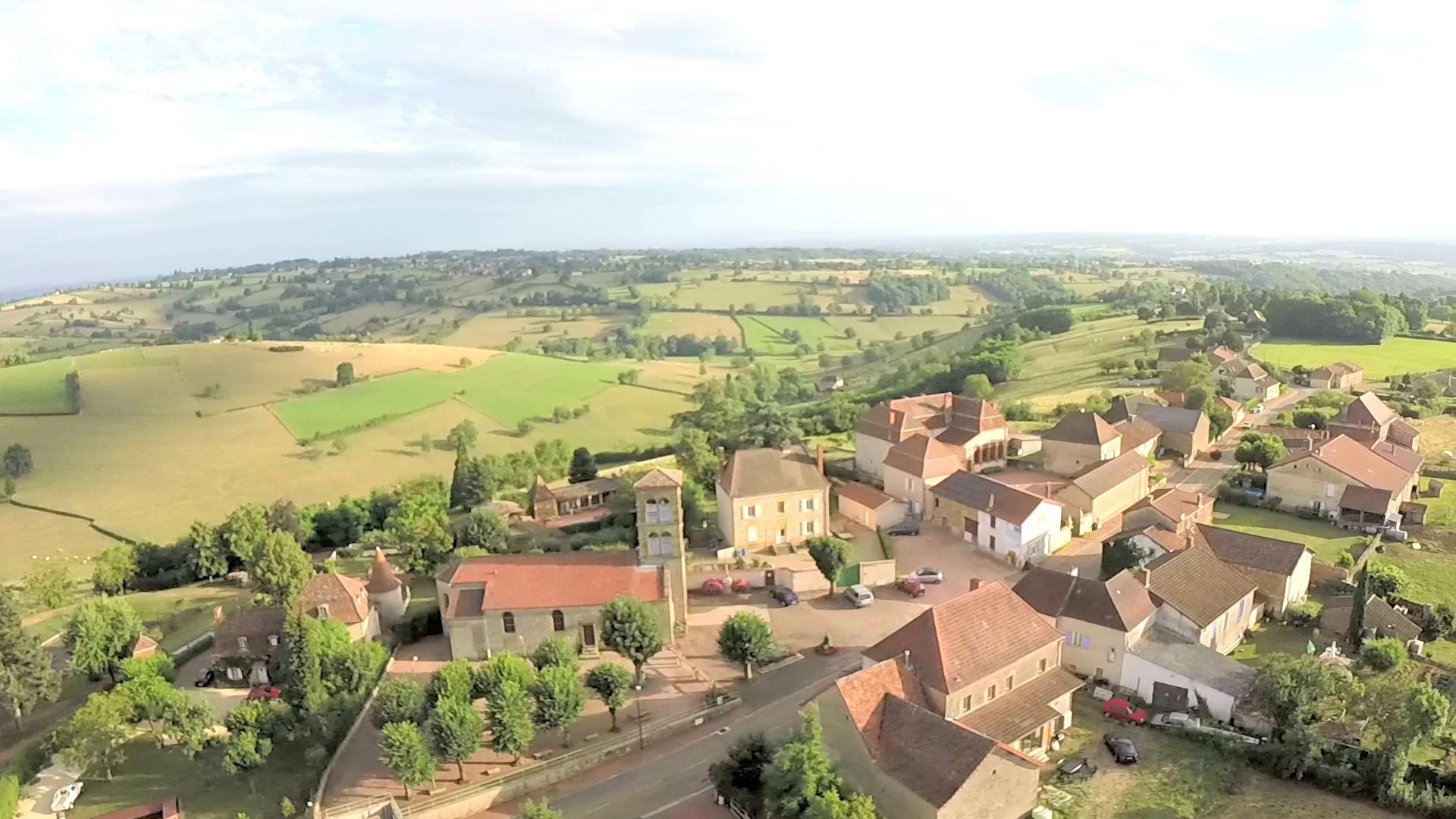 Le bourg de Mailly vu depuis le lieu dit "Les Chavannes"